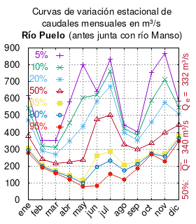 Curvas de variación estacional del río Puelo antes de junta con el río Manso. # Dirección General de Aguas # Santiago de Chile # Ministerio de Obras Públicas (Chile) # Análisis de metodología y determinación de cuadales de reserva turísticos # url: # CUADRO 6.2-8 CAUDALES MEDIOS MENSUALES EN ESTACIÓN FLUVIOMÉTRICA RÍO PUELO ANTES JUNTA CON RÍO MANSO pág. 168 mes 5% 10% 20% 50% 85% 90% 95% ene 617.4 544.4 474.0 378.6 306.2 294.0 278.5 feb 353.6 320.8 288.3 242.6 206.4 200.2 192.1 mar 351.8 310.2 270.1 215.3 173.6 166.5 157.5 abr 581.5 454.6 346.7 223.1 147.0 135.6 121.8 may 800.1 605.8 435.8 237.3 116.9 99.5 78.6 jun 642.3 620.3 583.7 476.4 260.5 193.4 81.3 jul 834.2 761.7 673.1 501.1 284.8 233.0 155.5 ago 443.0 424.1 396.4 327.4 208.4 174.2 118.6 sep 402.8 380.9 353.7 299.8 229.8 212.7 186.9 oct 755.1 589.0 461.5 335.7 278.5 272.9 267.8 nov 866.2 714.6 575.5 399.1 275.5 255.4 230.1 dic 584.6 549.5 510.6 445.7 380.1 366.5 347.6